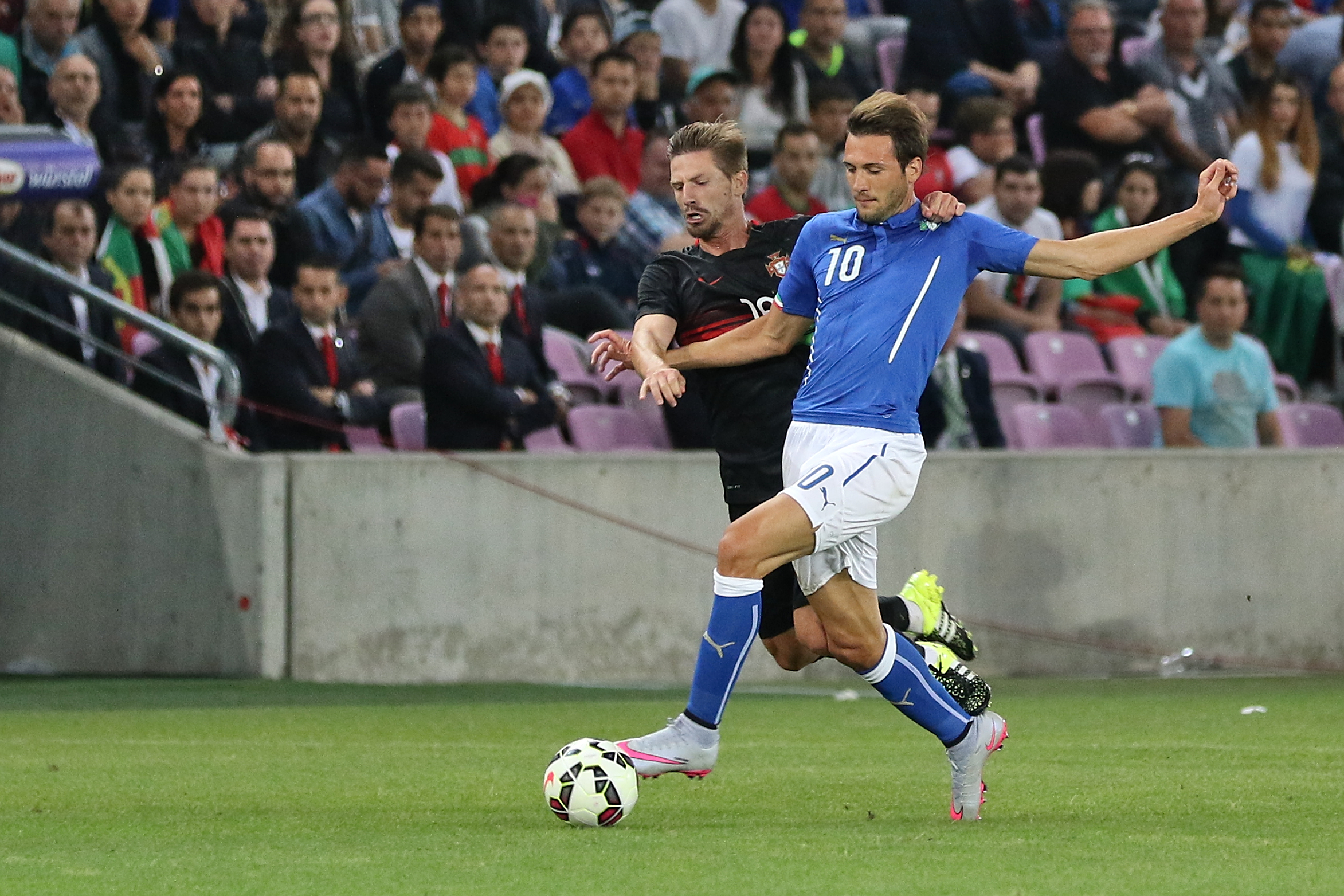 20150616 - Portugal - Italie - Genève - Adrien Silva et Franco Vazquez